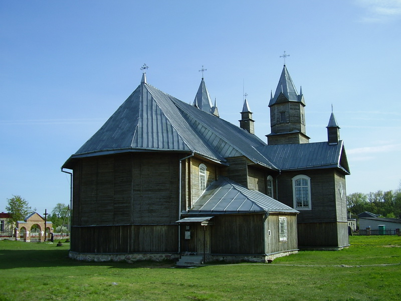 Кемелішкі. Касцёл Нараджэння Найсвяцейшай Дзевы Марыі